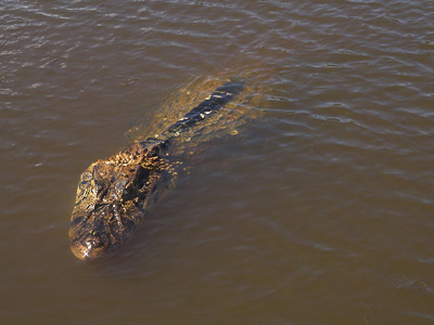 © Leonardo C. Fleck